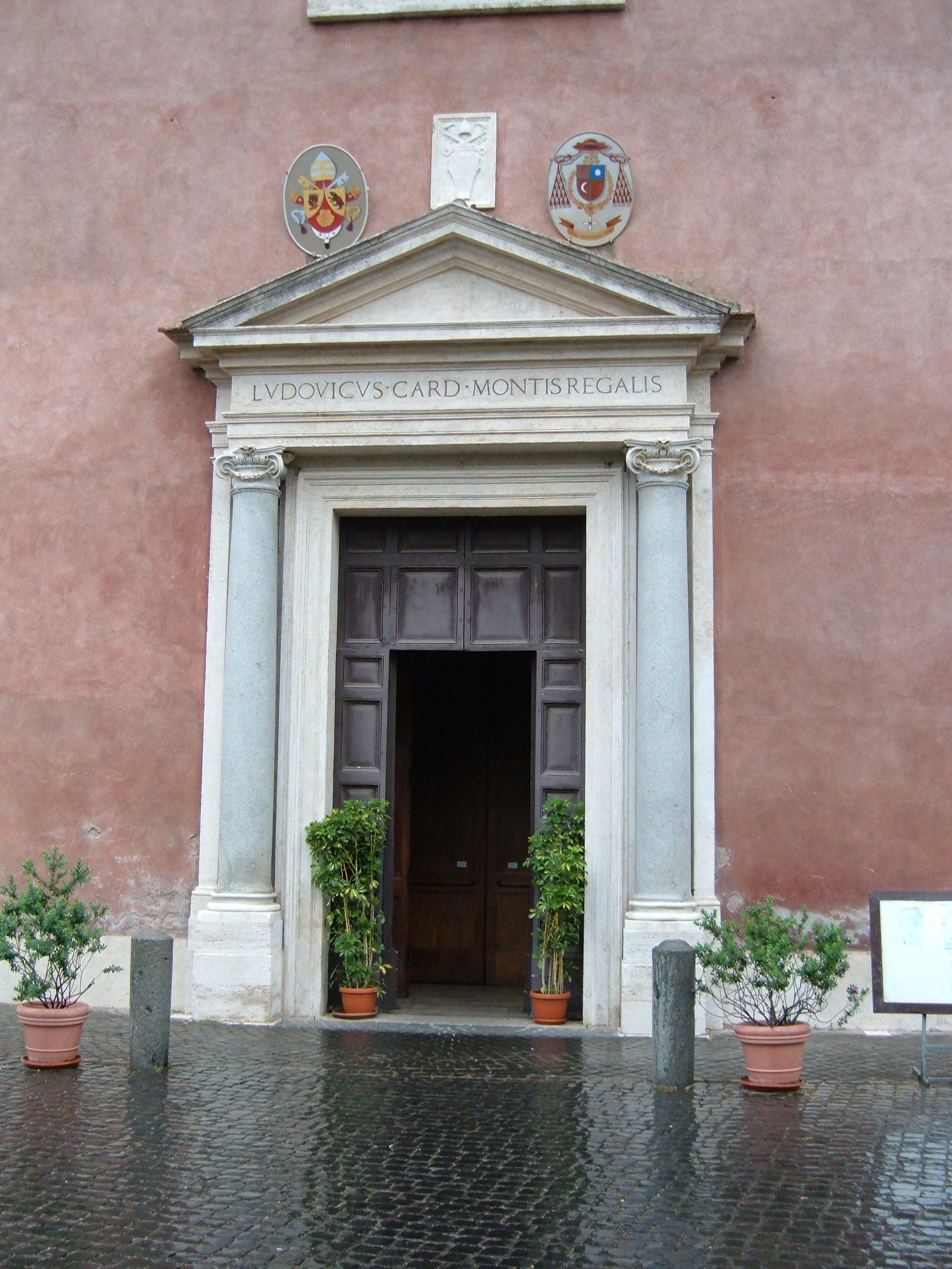 Chiesa di San Pancrazio, a Roma, nel quartiere Gianicolense. Portale d'entrata.